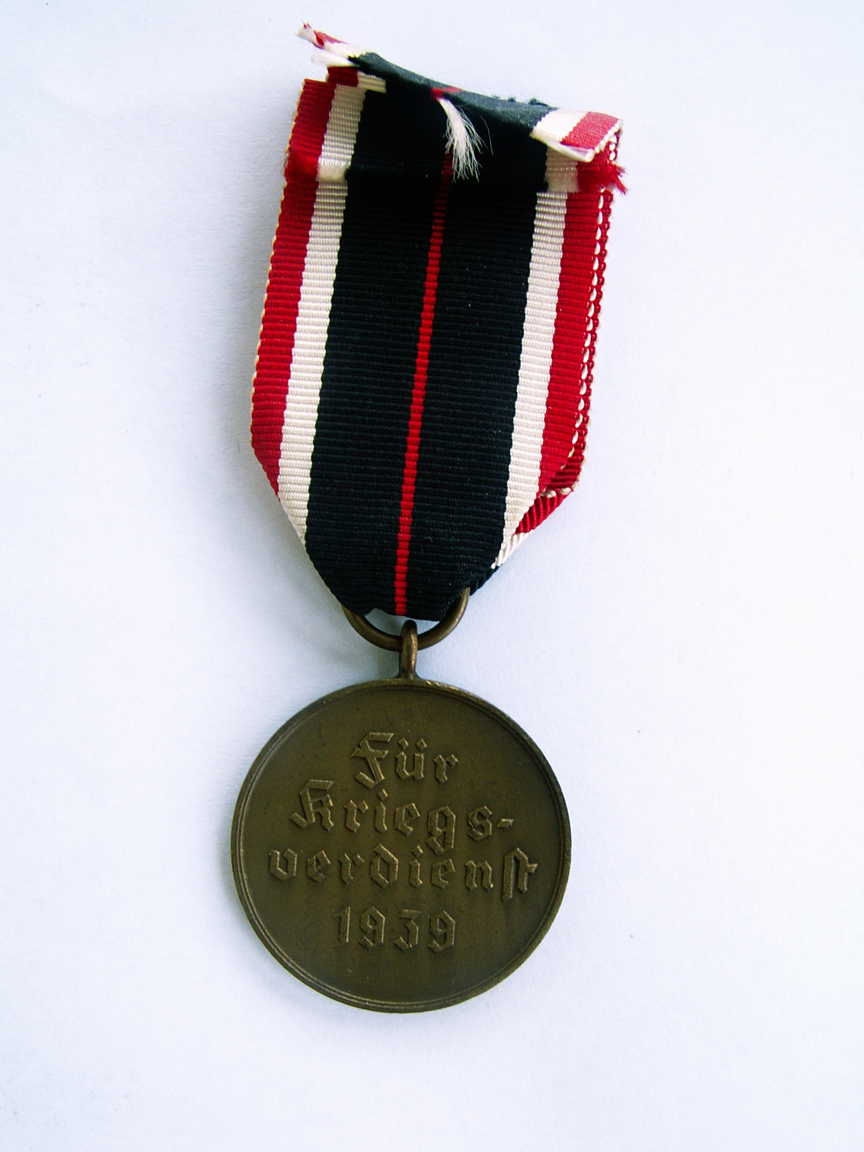 Obverse side of WW2 german War Merit Medal